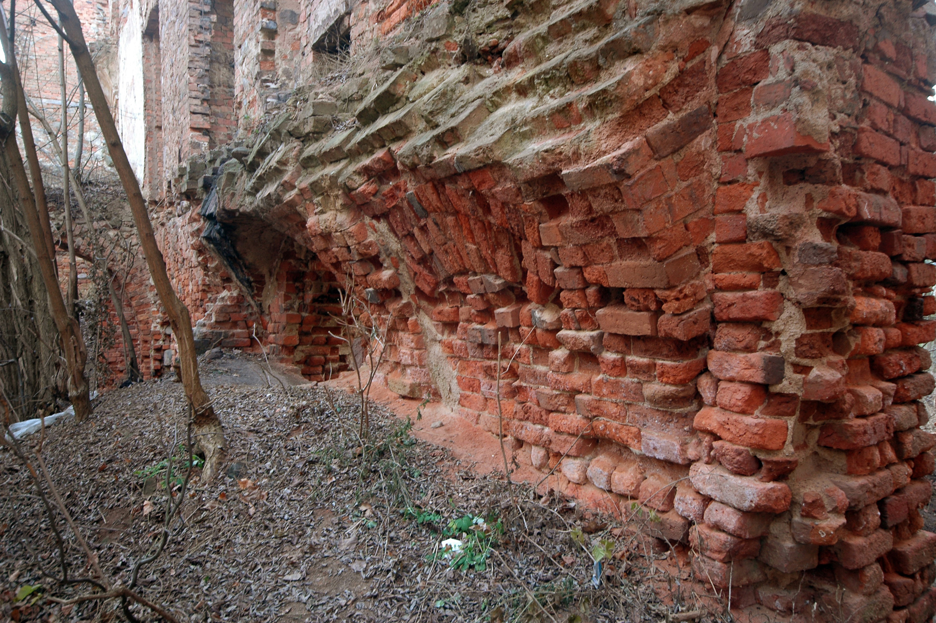 Krzydłowice - pałac (ruina) z parkiem (zabytek nr rejestr. A/2967/173/323/L z dn. 15.03.61)